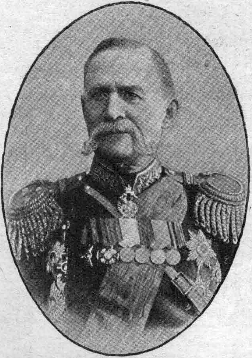 Адельсон, Николай Осипович: Чин/звание: «Генерал-от-кавалерии» Знаки различия на картине: эполеты и звёзды «Генерал-лейтенант»